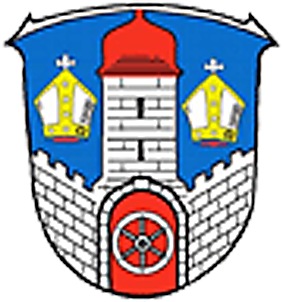 Wappen von Naumburg (Hessen)